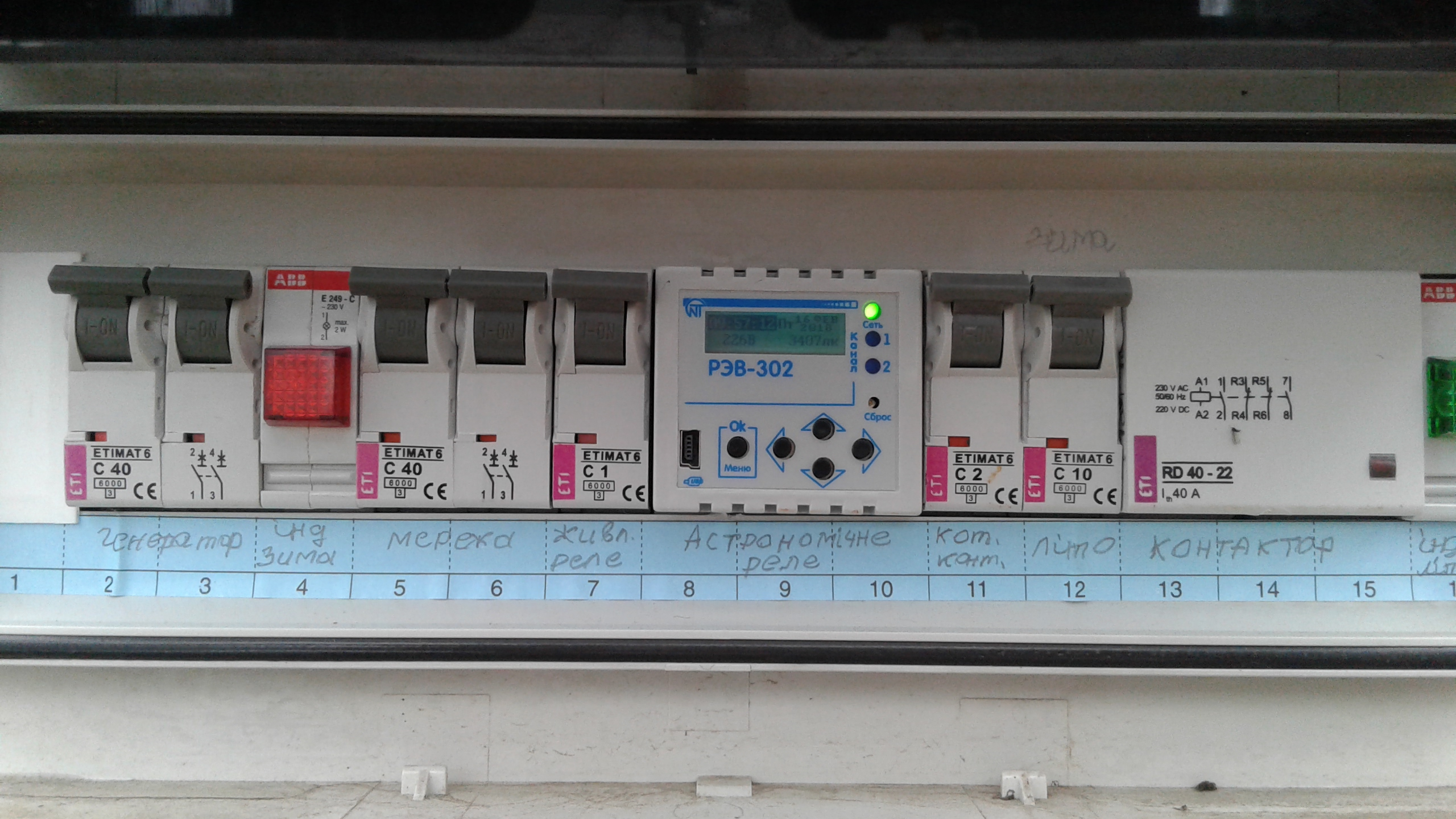 Щит керування